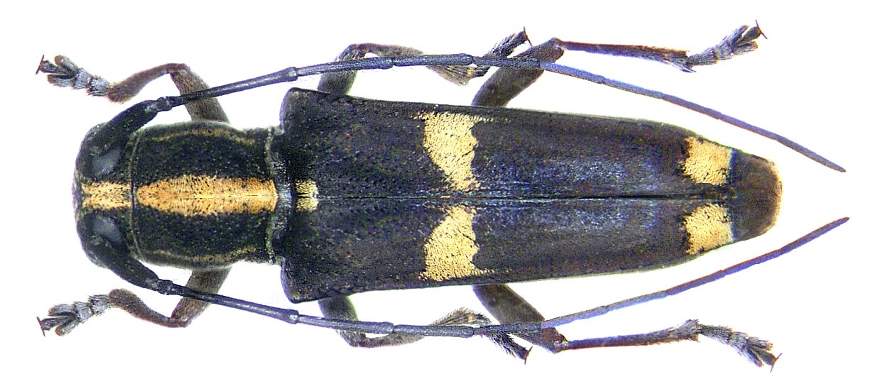 Familie: Cerambycidae Groesse: 10,5 mm Fundort: Indonesien, Irian Jaya, Salawati Isl., Kalian leg. A.Skale, 2004; det. A.Weigel Photo: U.Schmidt, 2007